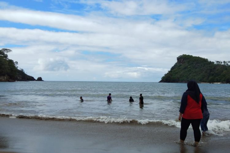 Foto pantai Wediawu